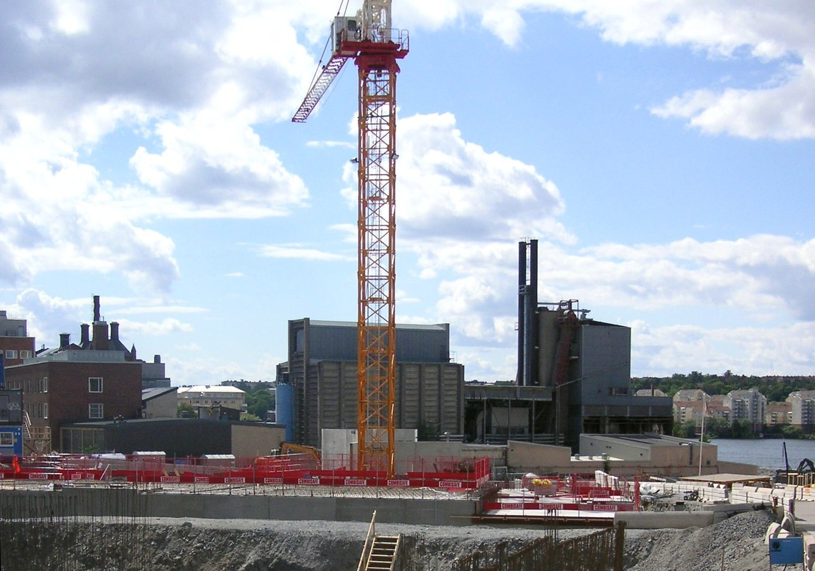 Hornsbergs asfaltverk kort innan rivning